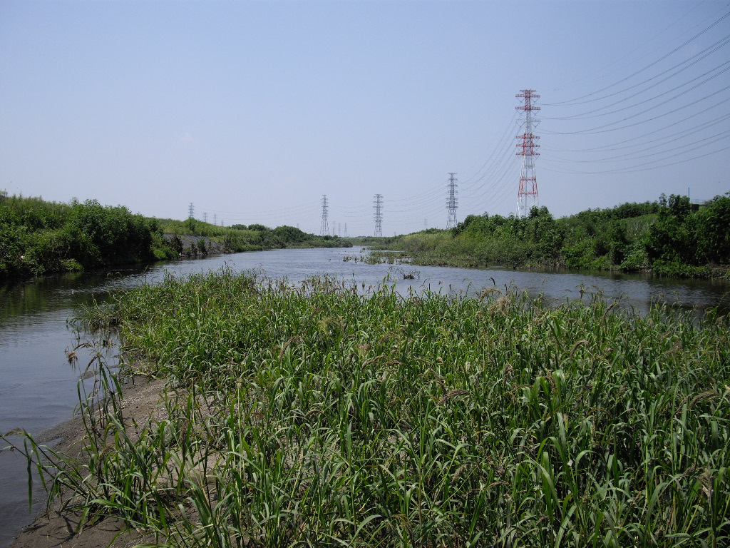 埼玉県北西部を流れる小山川（利根川水系・一級河川）。撮影地点は共栄橋（深谷市起会）